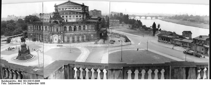 Dresden, Theaterplatz, Semper-Oper, Semper-Galerie Zentralbild Salzbrenner-14.9.1955 Wiederaufbau der Semper-Galerie in Dresden (II). Die Regierung der DDR gab den Auftrag, beschleunigt die Wiederaufbauarbeiten der Semper-Galerie am Dresdener Zwinger durchzuführen. Die Galerie soll bereits 1956 wieder die wertvollen Gemälde der Dresdner Galerie, die von der Regierung der UdSSR die an die Regierung der DDR übergeben wurden aufnehmen. Die Projektierungsarbeiten wurden durch die Unterstützung von Architekten der Fakultät für Bauwesen an der TH Dresden durch das Entwurfbüro für Hochbau und des VEB Industrieentwurf vorfristig fertig. Für alle Bauabschnitte des Wiederaufbaus, der entgegen der früher vorgesehenen 4 Jahre nur 1 Jahr dauern wird, liegen Selbstverprlichtungen der Bauarbeiter vor. UB.z.: Blick von der Hofkirche auf den Theaterplatz. (links) die Semper Galerie, welche den Zwingerhof zum Theaterplatz abschliesst. Ganz links die Schinkel-Wache. Mitte: die Semper-Oper, rechts: die Elbe davor das "Italienische Dörfchen". (5-teiliges Panorama)